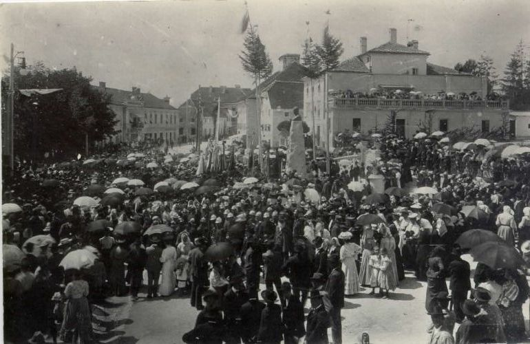 Odkritje spomenika Miroslavu Vilharju v Postojni